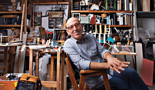 פרופסור נחום טבת - פיסול